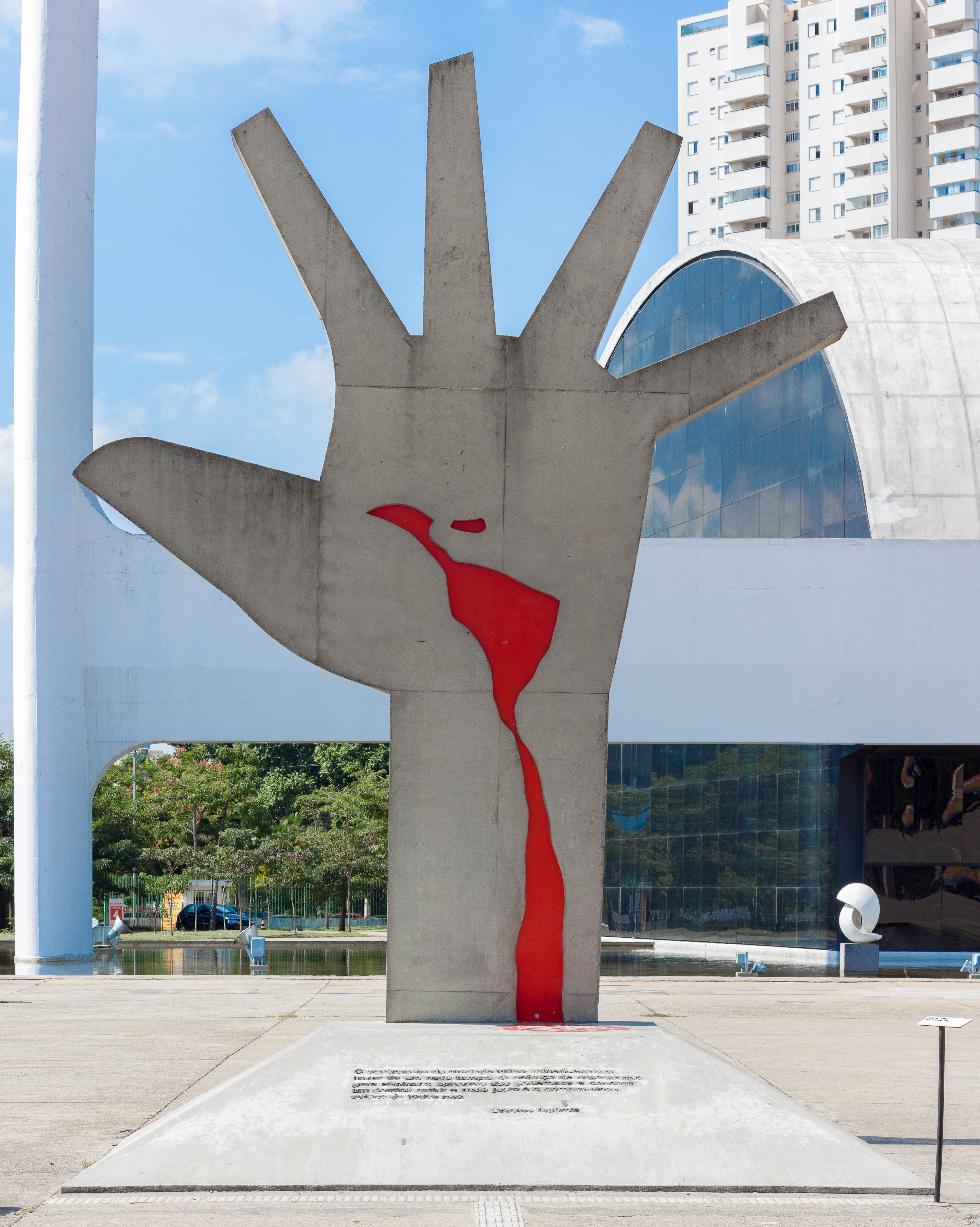 Mão, escultura de Oscar Niemeyer localizada na Praça Cívica no Memorial da América Latina. Abaixo está escrito: "O sentimento da unidade latino americana é o limiar de um novo tempo. O esforço de organização para eliminar a opressão dos poderosos e construir um destino maior e mais justo é o compromisso solene de todos nós." -- Orestes Quércia